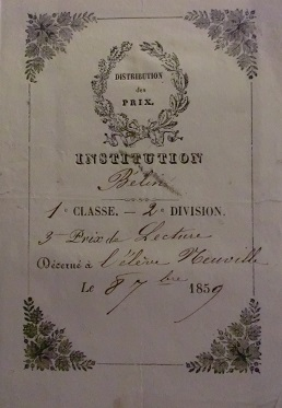 Ex praemio